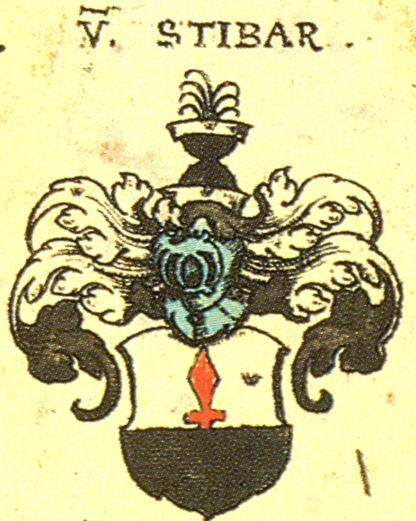 Wappen der Fränkischen Adelsfamilie Stibar